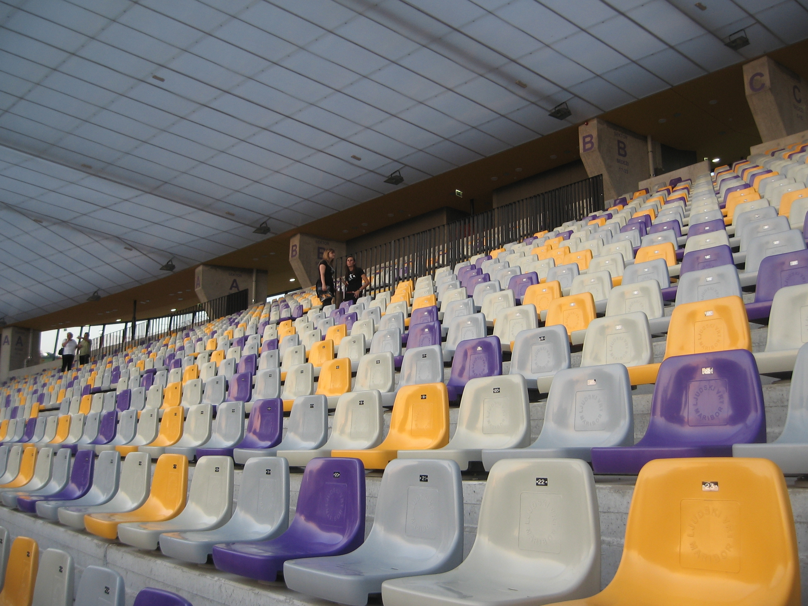 Stadion Ljudski vrt, Maribor / Stadion Ljudski Vrt, Maribor